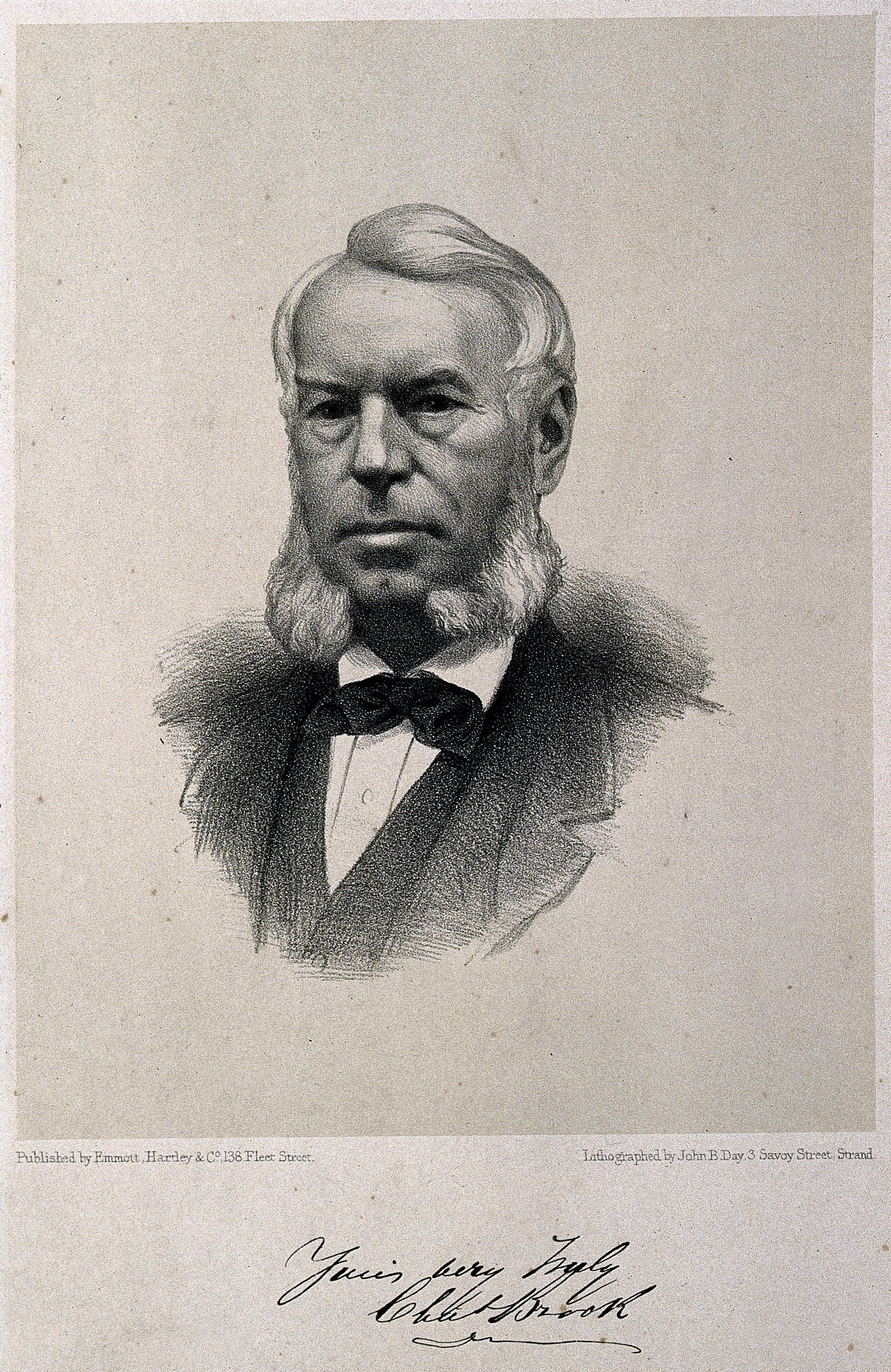 Genre/Technique: Portrait prints. Lithographs. Subject name: Brook, Charles, 1814-1872.